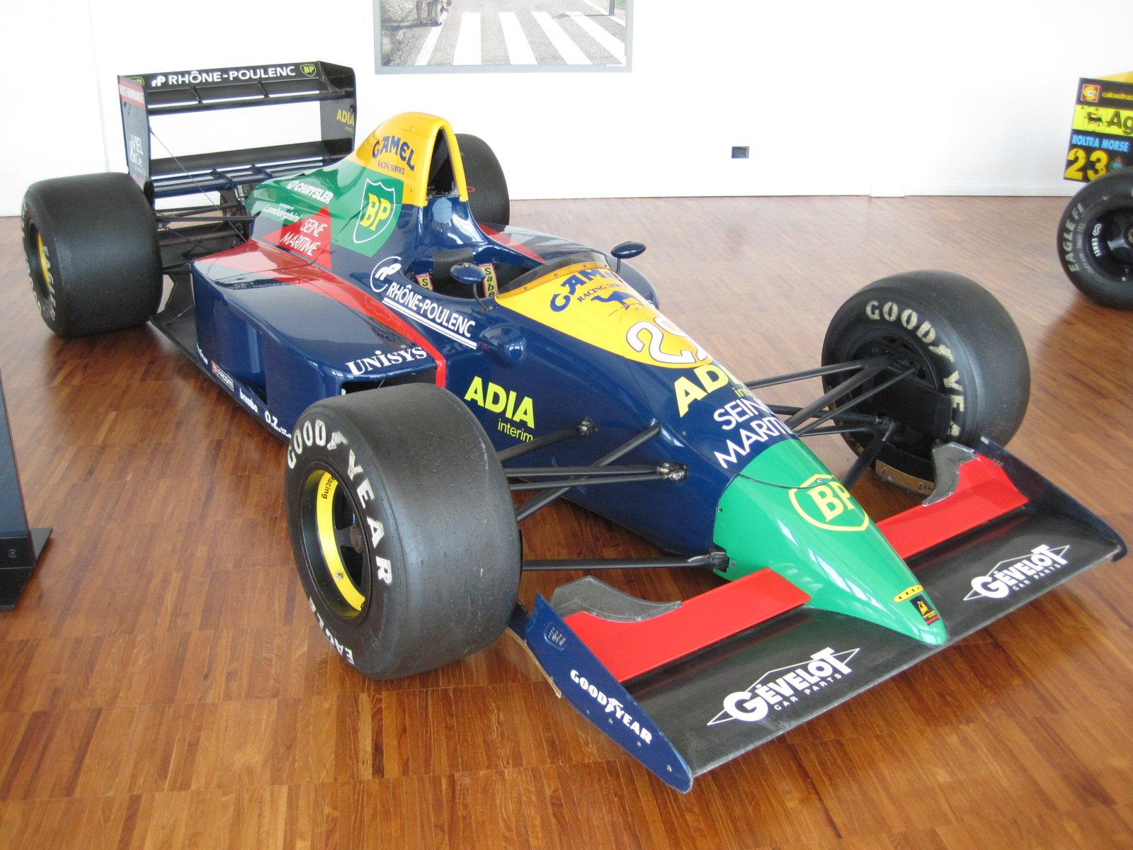 Musée Lamborghini - Lola Larousse LC 89 F1 - 1989